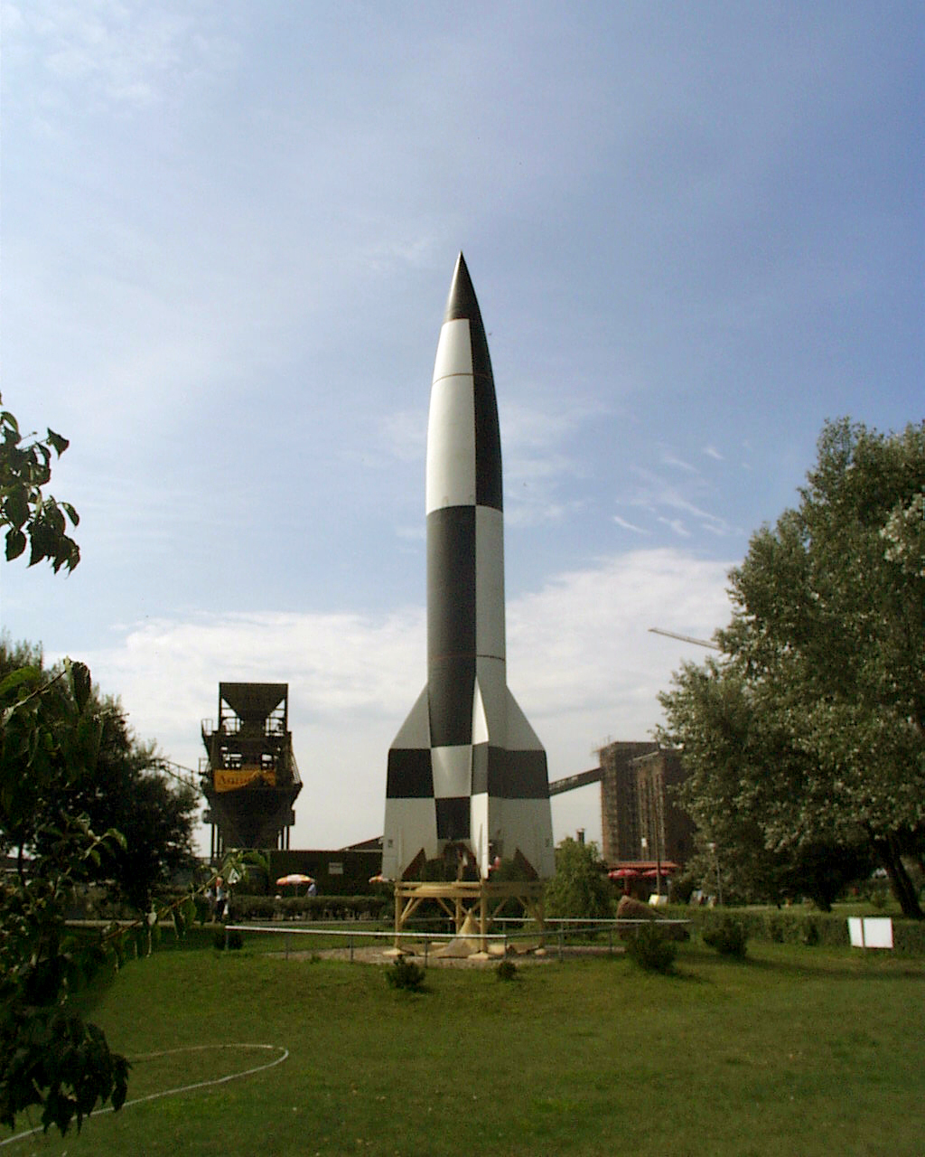 Die V2